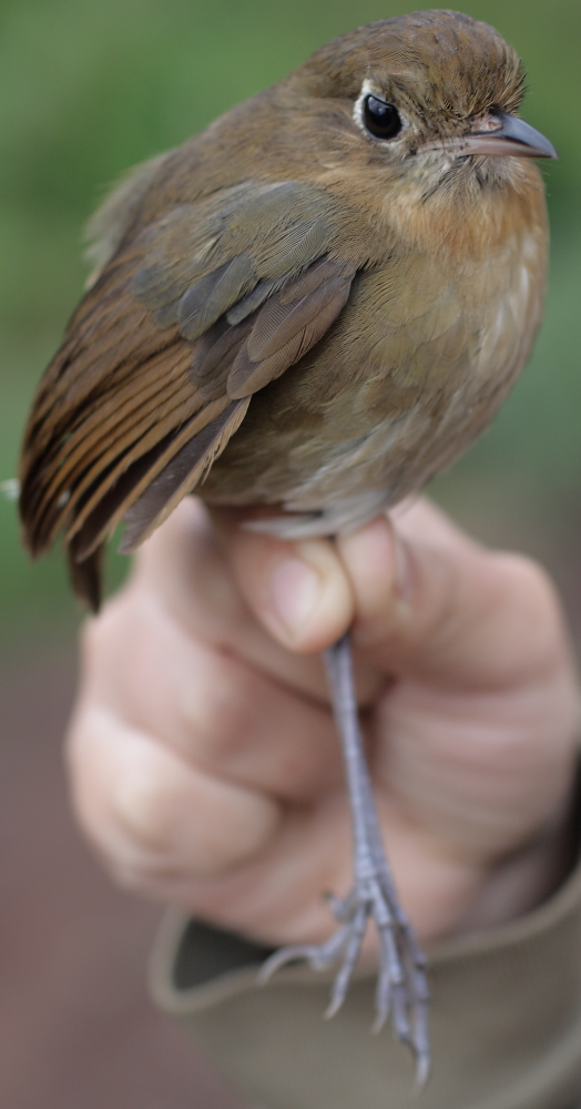 Grallaria rufula saltuensis Birds of Serranía de Perijá of Colombia and Venezuela (Ornitologia Colombiana [2014] 14: 62–93)